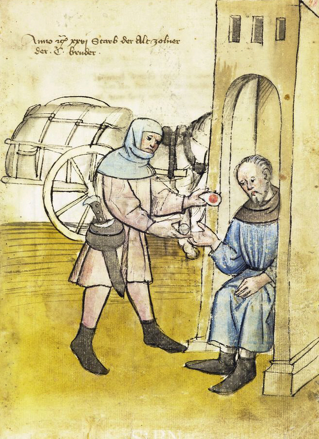 N.N. zolner (Zöllner) , zolner (Zöllner) Transkription und weitere Informationen